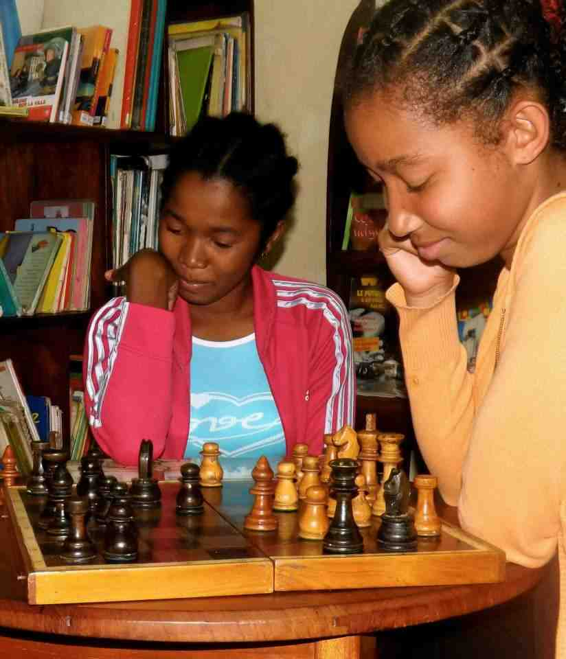 Activités dans la bibliothèque de l'Alliance de Sambava